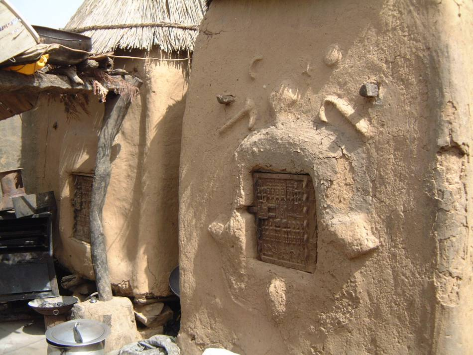 Photo personnelle prise dans le village de Sangha (Mali) par Nerijp